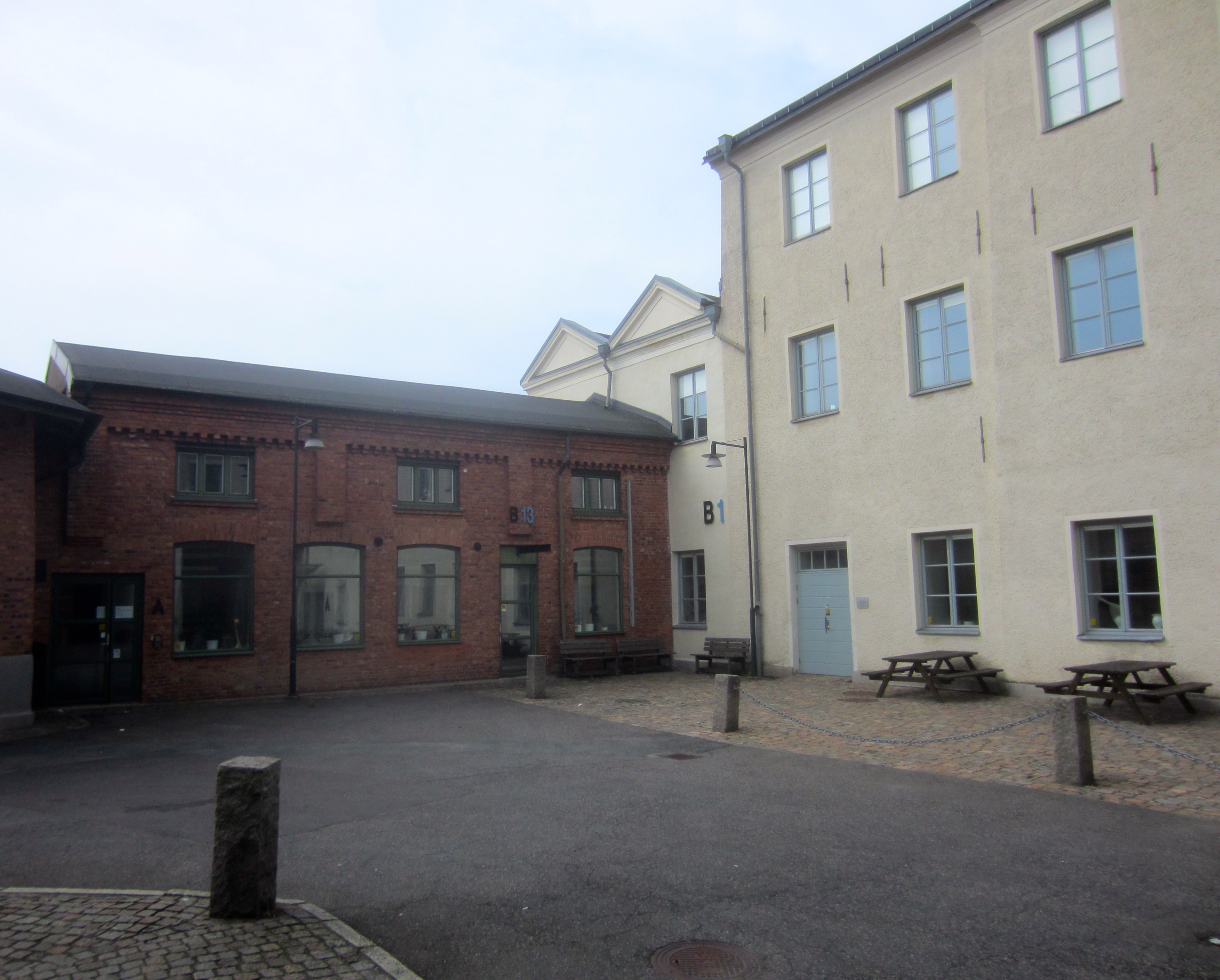 Sahlgrenska sockerbruket från söder, Ånäs landeri.